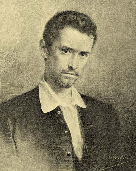 Petőfi Sándor portréja. Roskovics Ignác rajza 1849-es daguerrotyp-felvétel alapján, Barabás Miklós és Orlay Petrich Soma rajzai felhasználásával